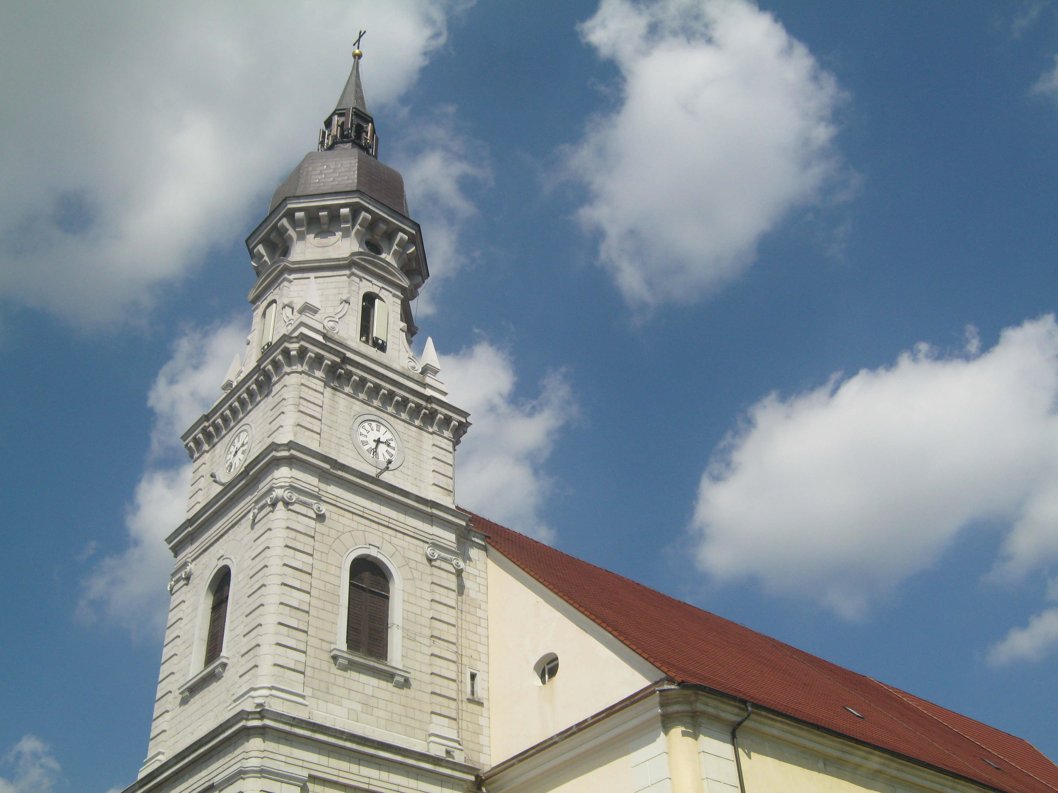 Barokowa świątynia w Nowogrodźcu.